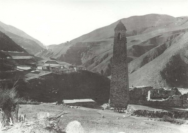 Боевая башня Цуровых (Чурой-тайпа) в с. Джейрах. 1921 г